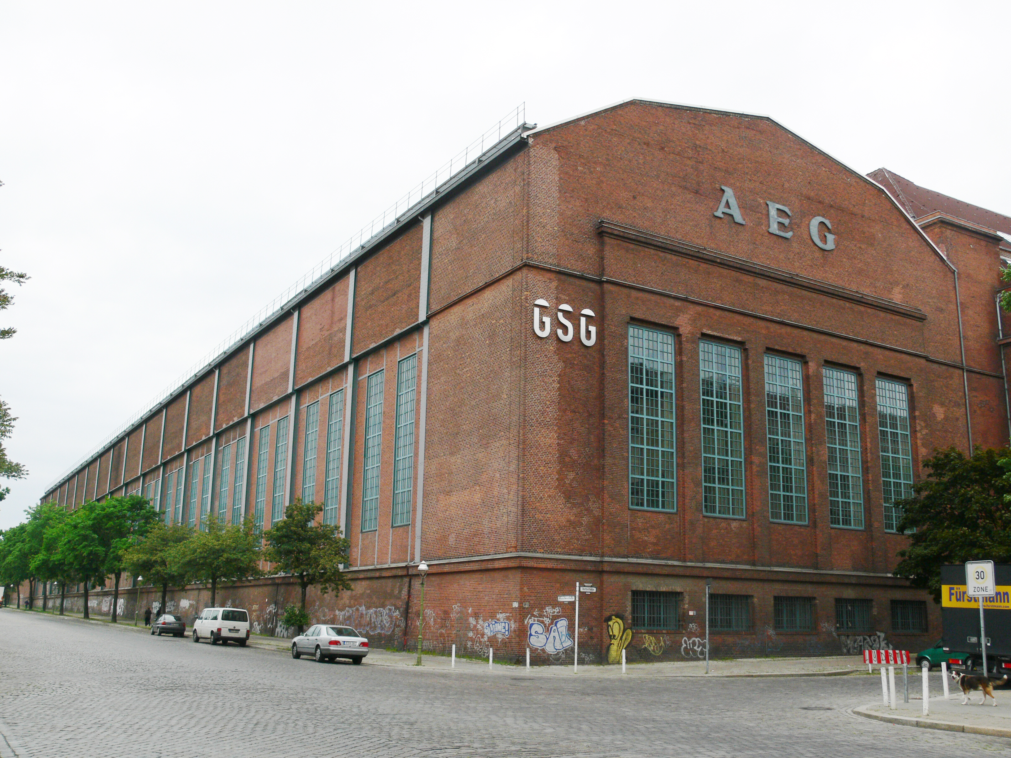 Berlin-Gesundbrunnen, AEG-Fabriken am Humboldthain Montagehalle für Großgeräte, Voltastraße/Hussitenstraße